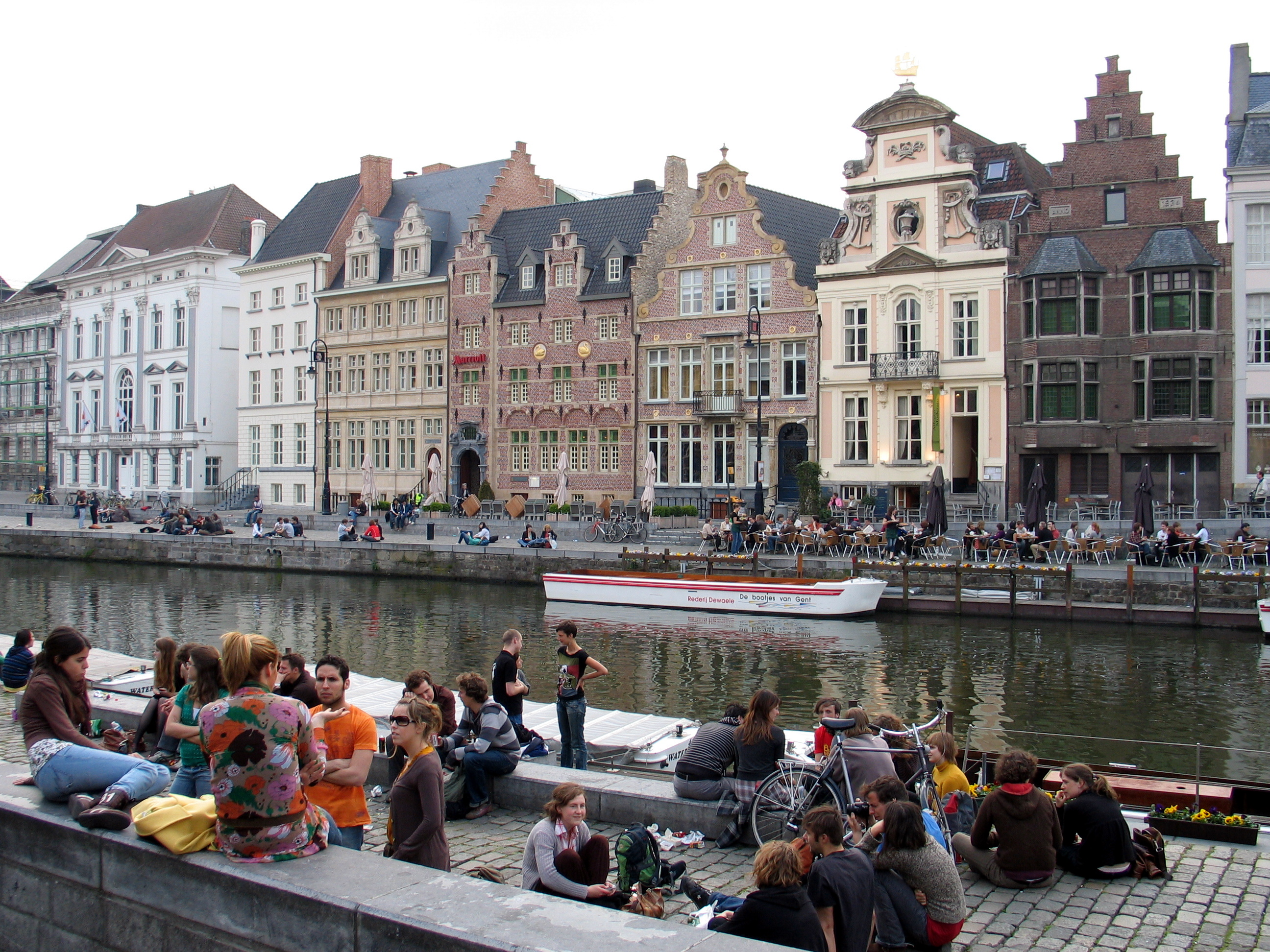 Korenlei te Gent, België